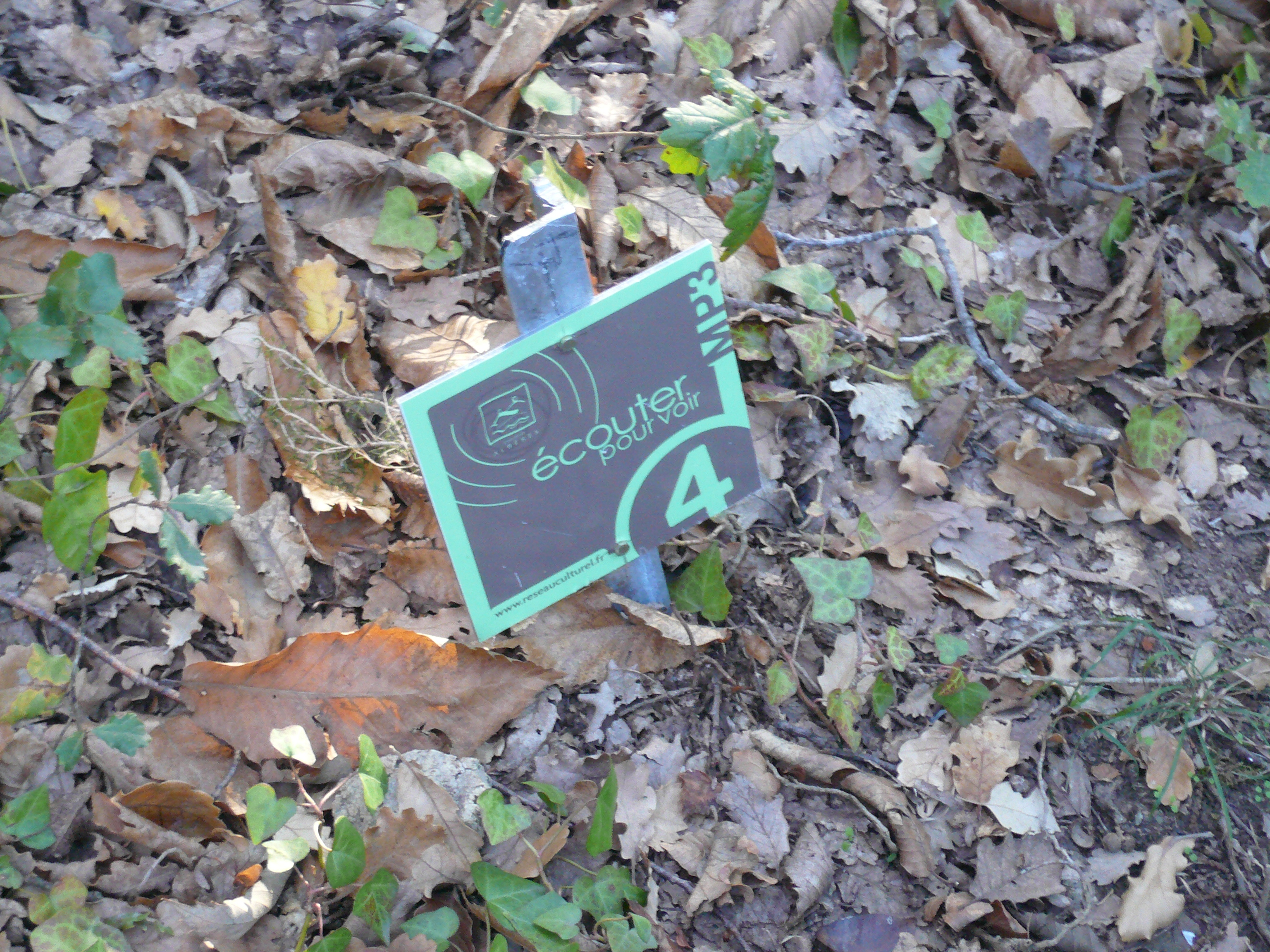 Panneau du parcours sonore MP3 d'Argeles-sur-Mer